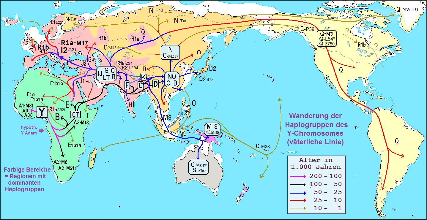 Wannderung von Y-Haplogruppen von Afrika nach Eurasien